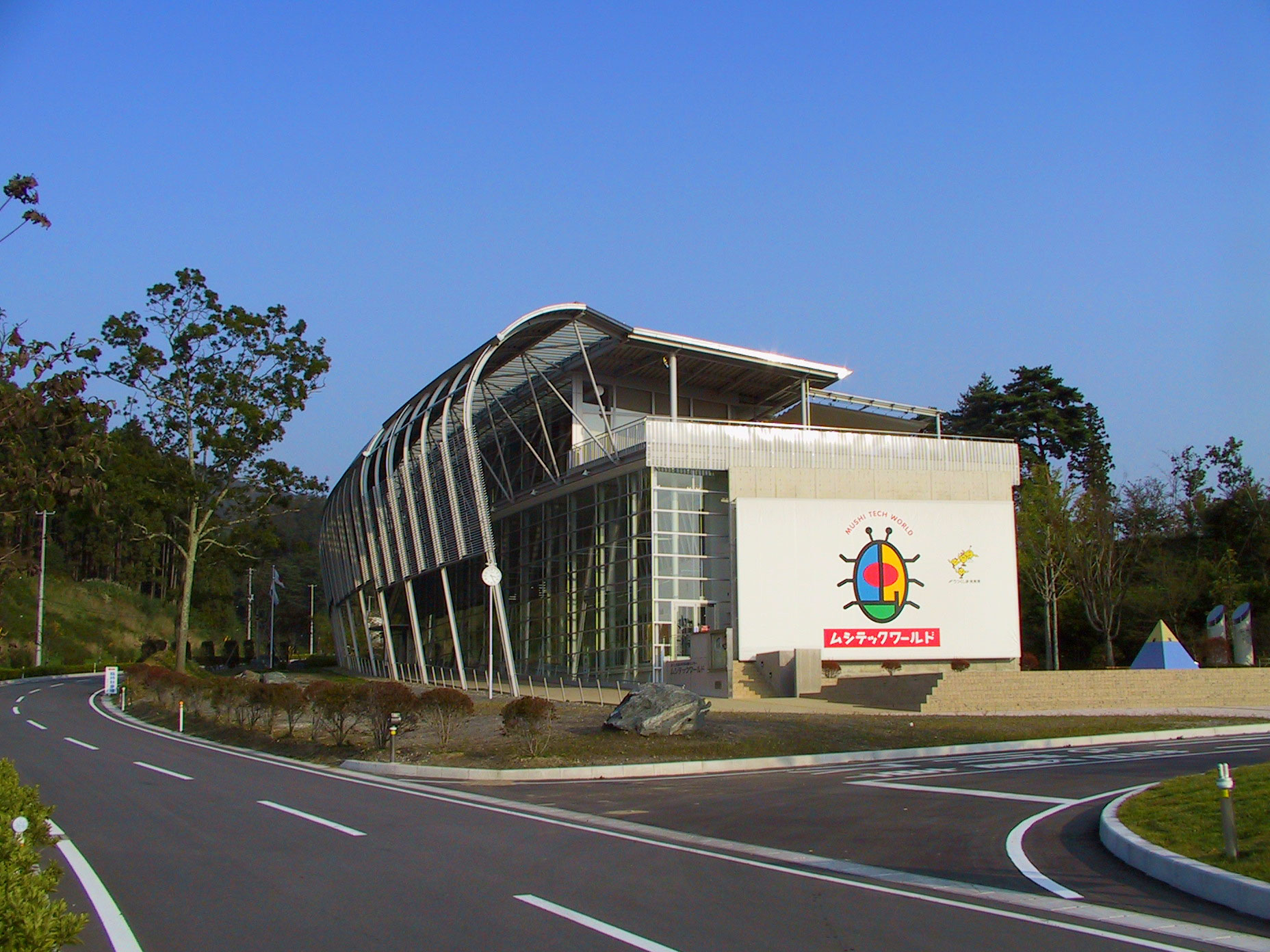 ムシテックワールド外観